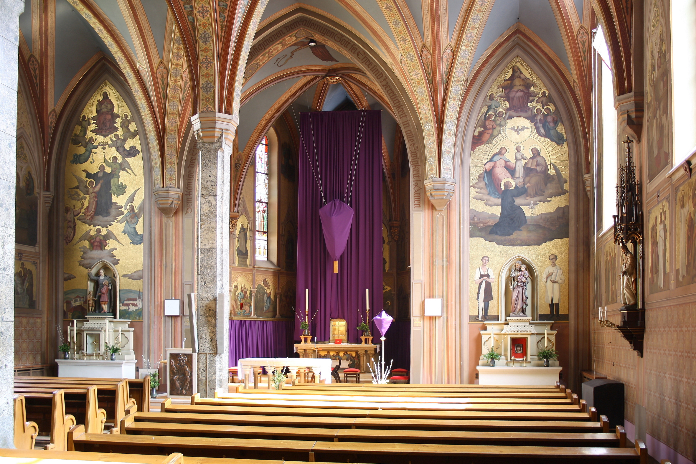 Innenansicht der Pfarr- und Klosterkirche hl. Maria Immaculata (Wien) im Wiener Ortsteil Strebersdorf.